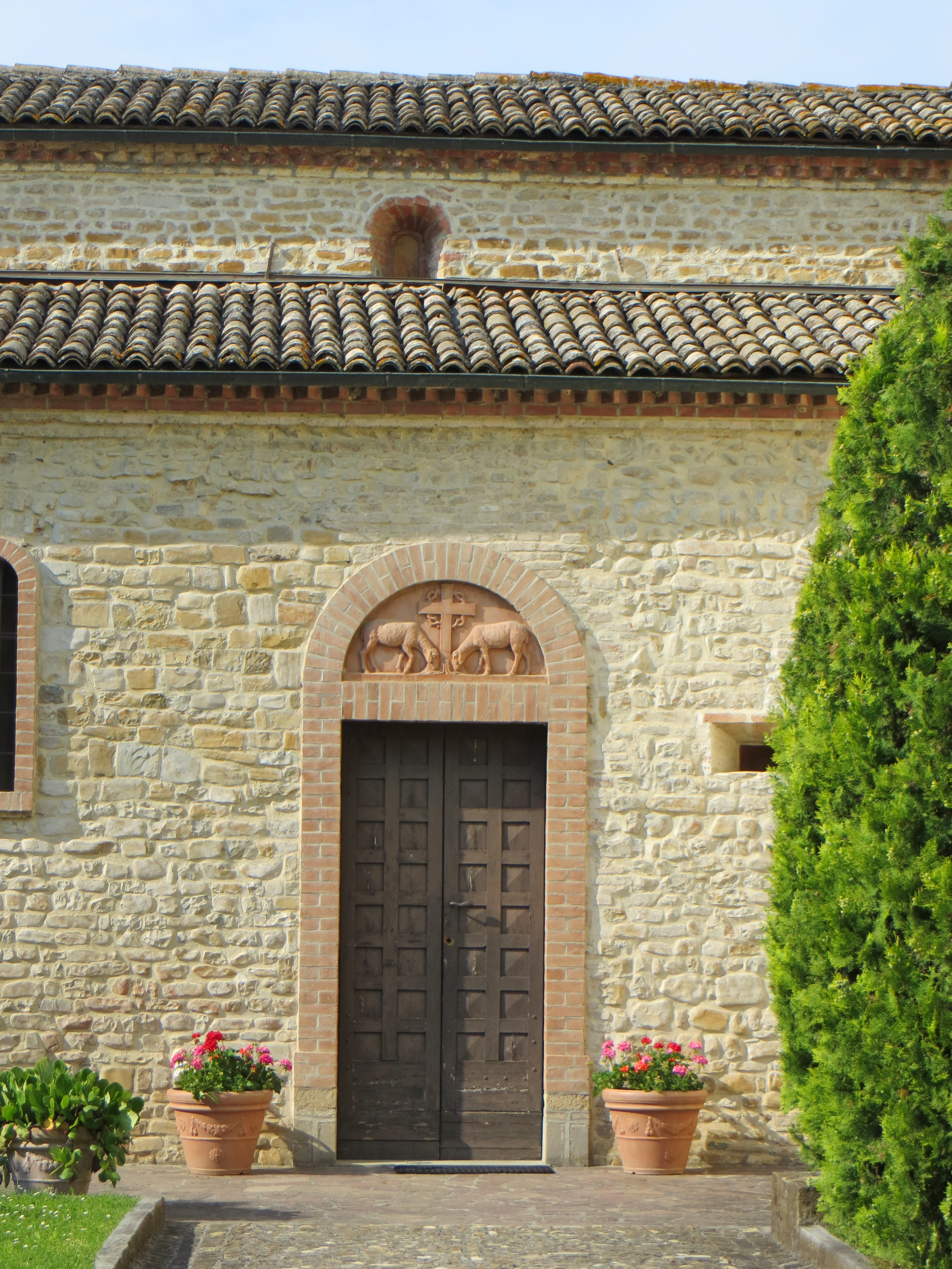 Pieve dei Santi Ippolito e Cassiano (Gaione, Parma) - ingresso lato sud